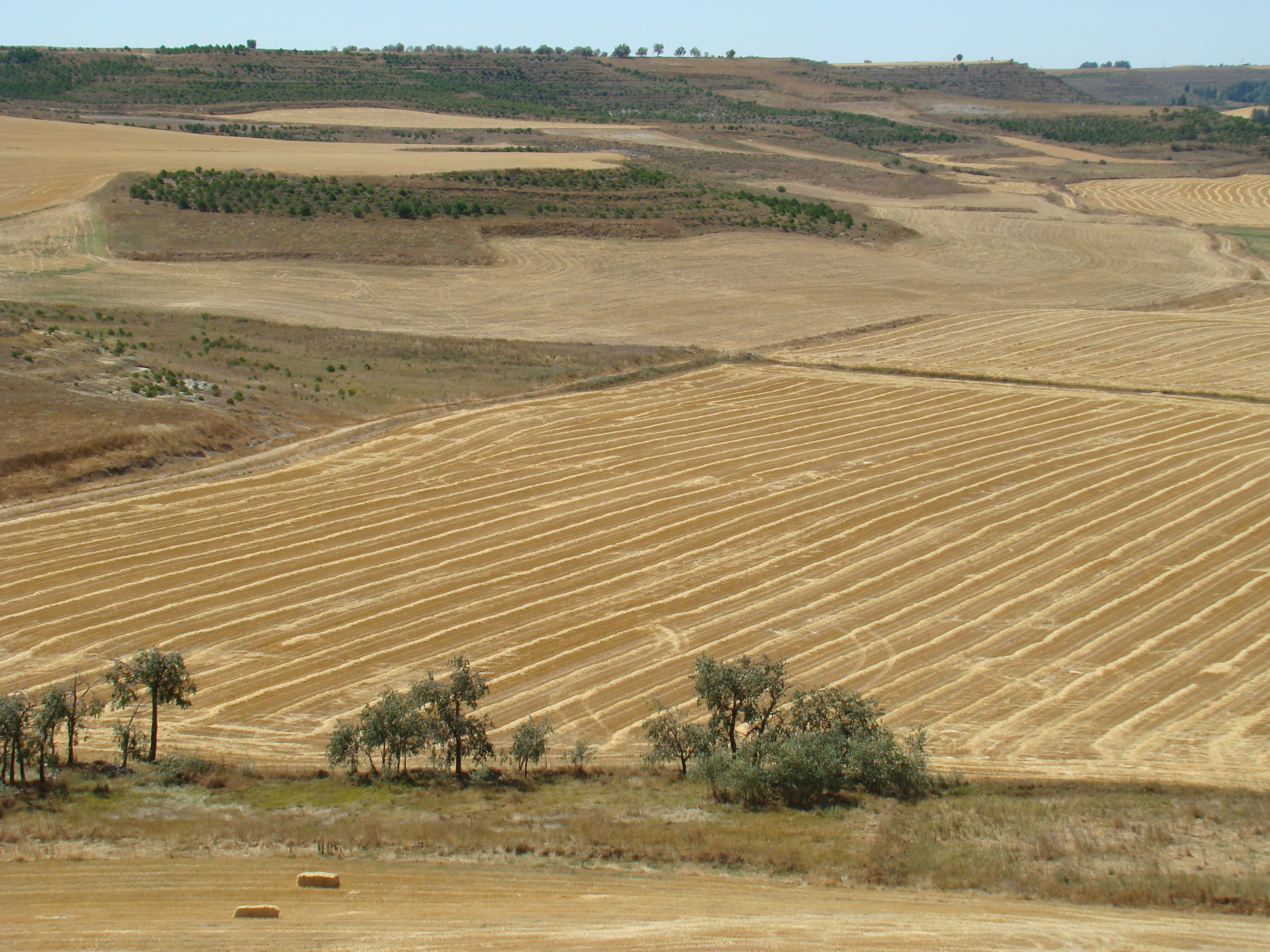 Montealegre de Campos en la provincia de Valladolid (España), en el verano del 2008. Campos de cereal segados y zonas verdes.